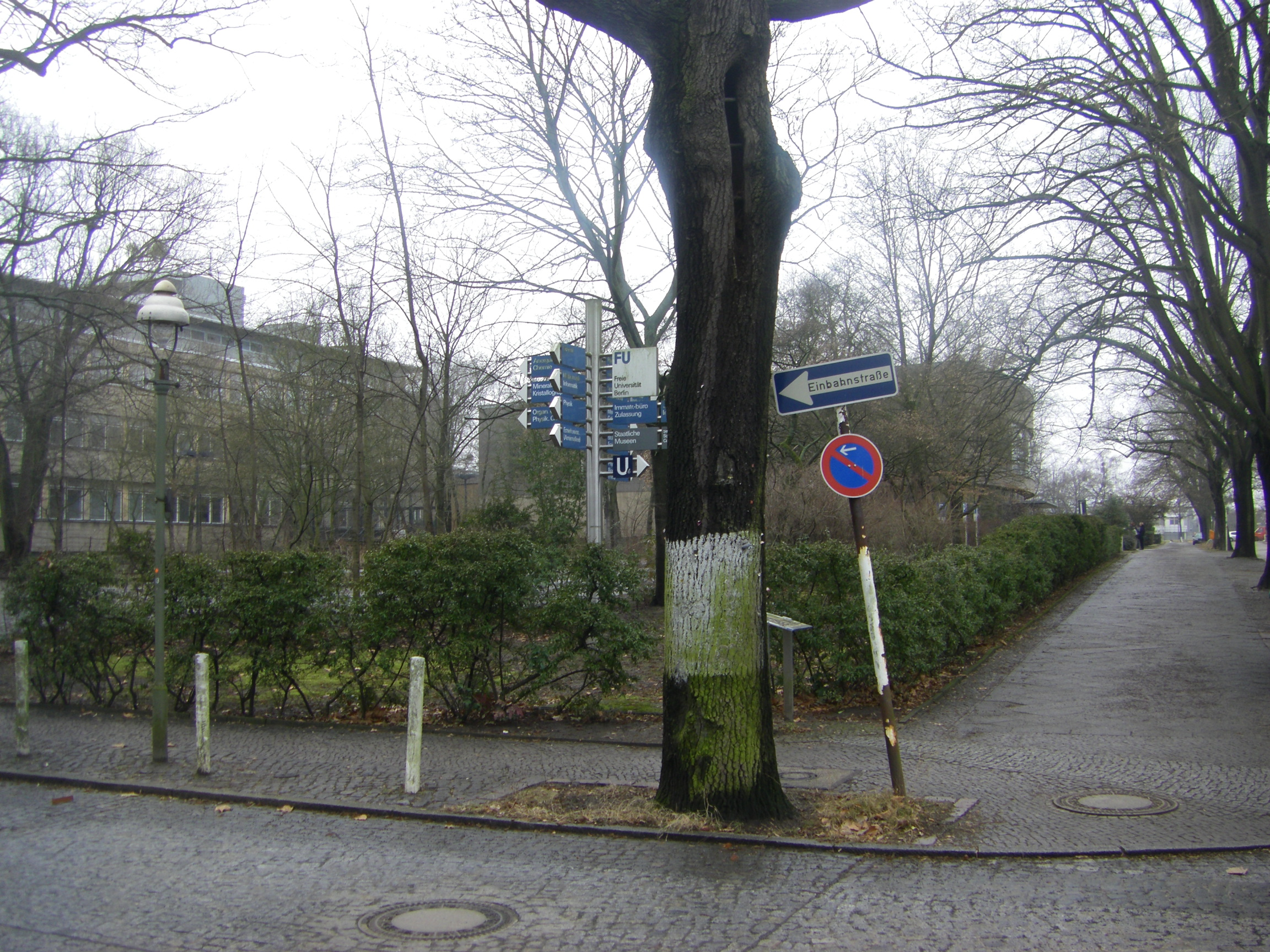 Berlin-Dahlem Arnimallee 22 Freie Universität Berlin